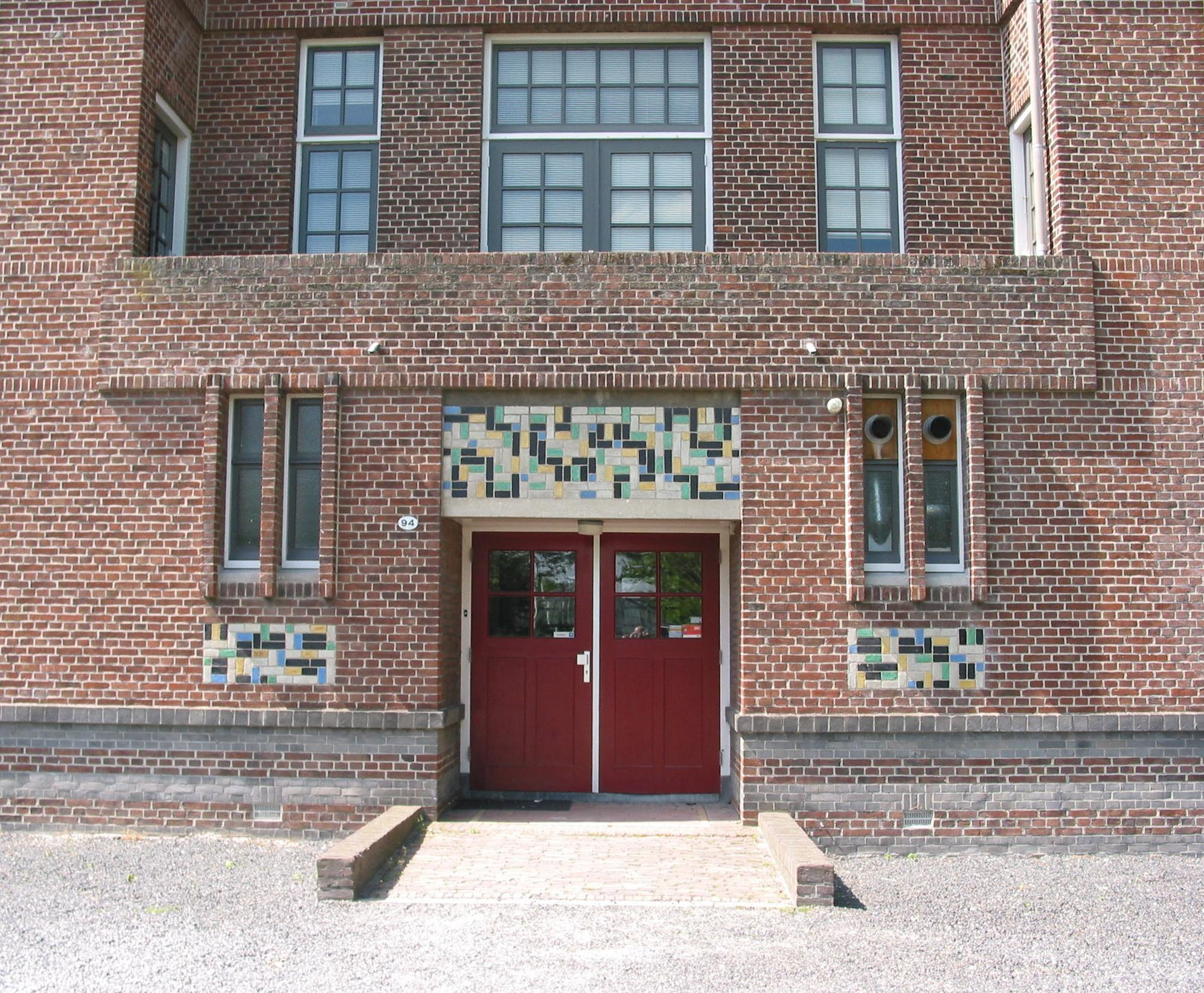 De Vonk vacation hostel, Noordwijkerhout (architect J.J.P. Oud, decorator Theo van Doesburg). 1917-1918.